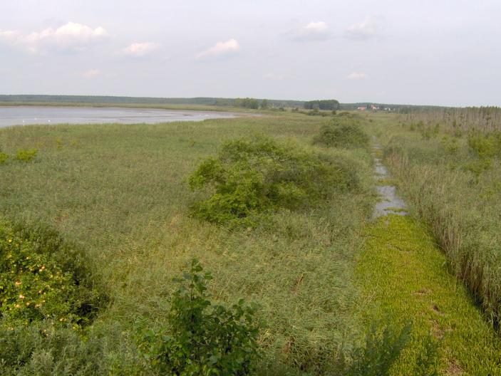 Świdwie (jezioro) - rezerwat